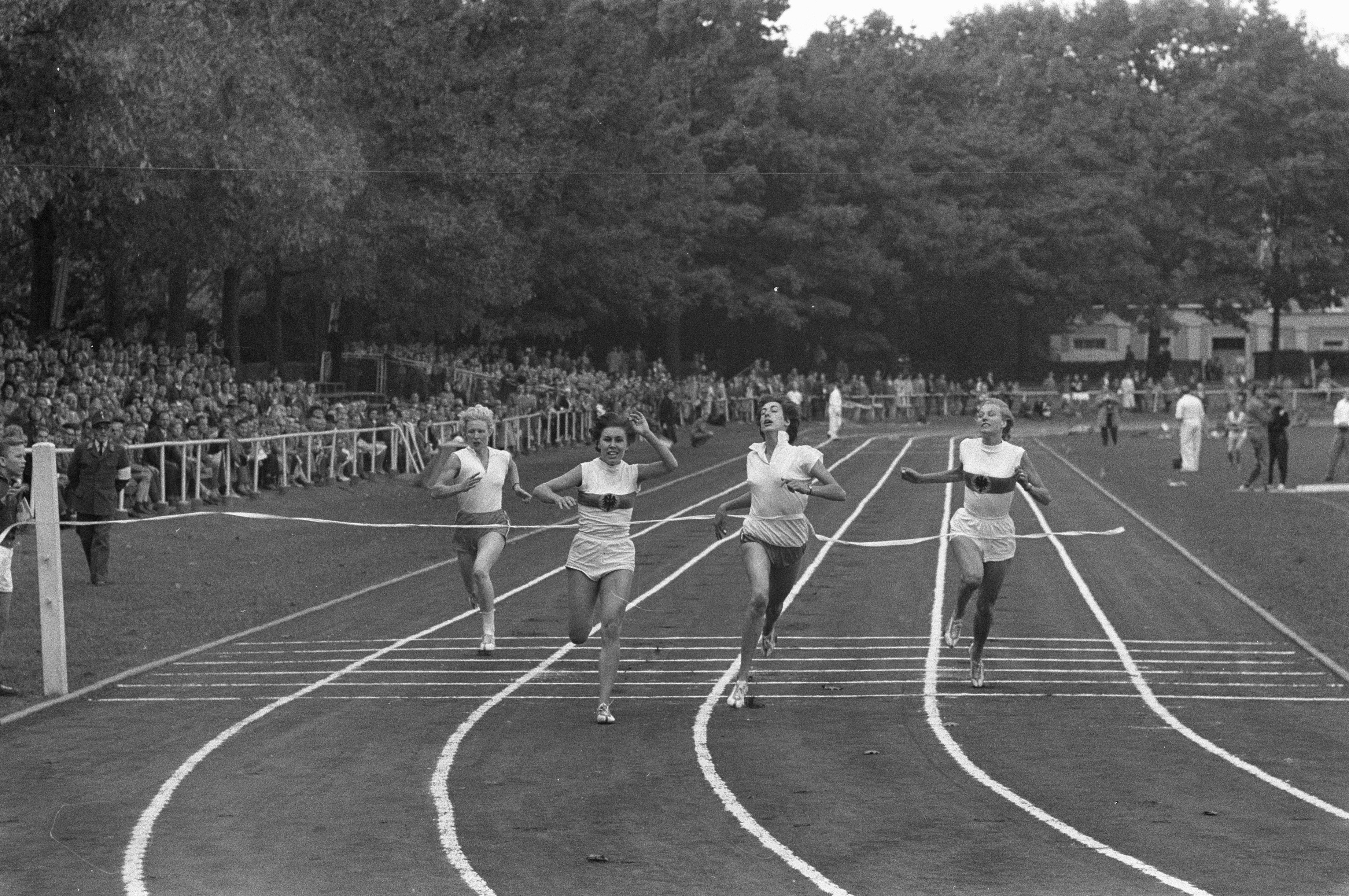 Collectie / Archief : Fotocollectie Anefo Reportage / Serie : [ onbekend ] Beschrijving : Atletiek dames Duitsland Nederland te Aken, 100 meter sprint v.l.n.r. I. ter Laak , H. Huttmann , J. Bijleveld en M. Wessel Datum : 27 september 1959 Locatie : Aken, Duitsland, Nederland Trefwoorden : ATLETIEK, SPRINTen Persoonsnaam : H. Huttmann, I. ter Laak, J. Bijleveld, M. Wes Fotograaf : Pot, Harry / Anefo Auteursrechthebbende : Nationaal Archief Materiaalsoort : Negatief (zwart/wit) Nummer archiefinventaris : bekijk toegang 2.24.01.05 Bestanddeelnummer : 910-7053